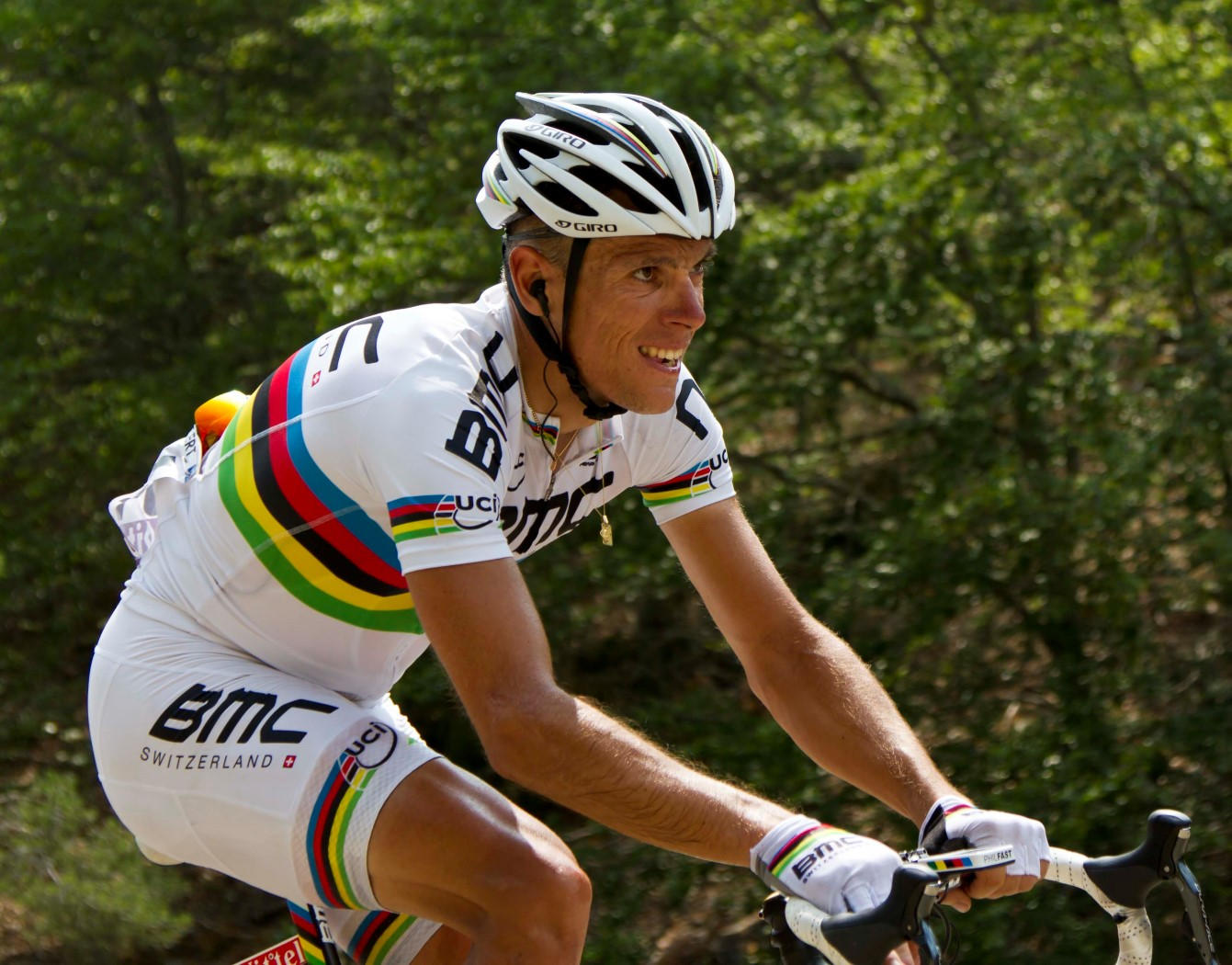 076 gilbert